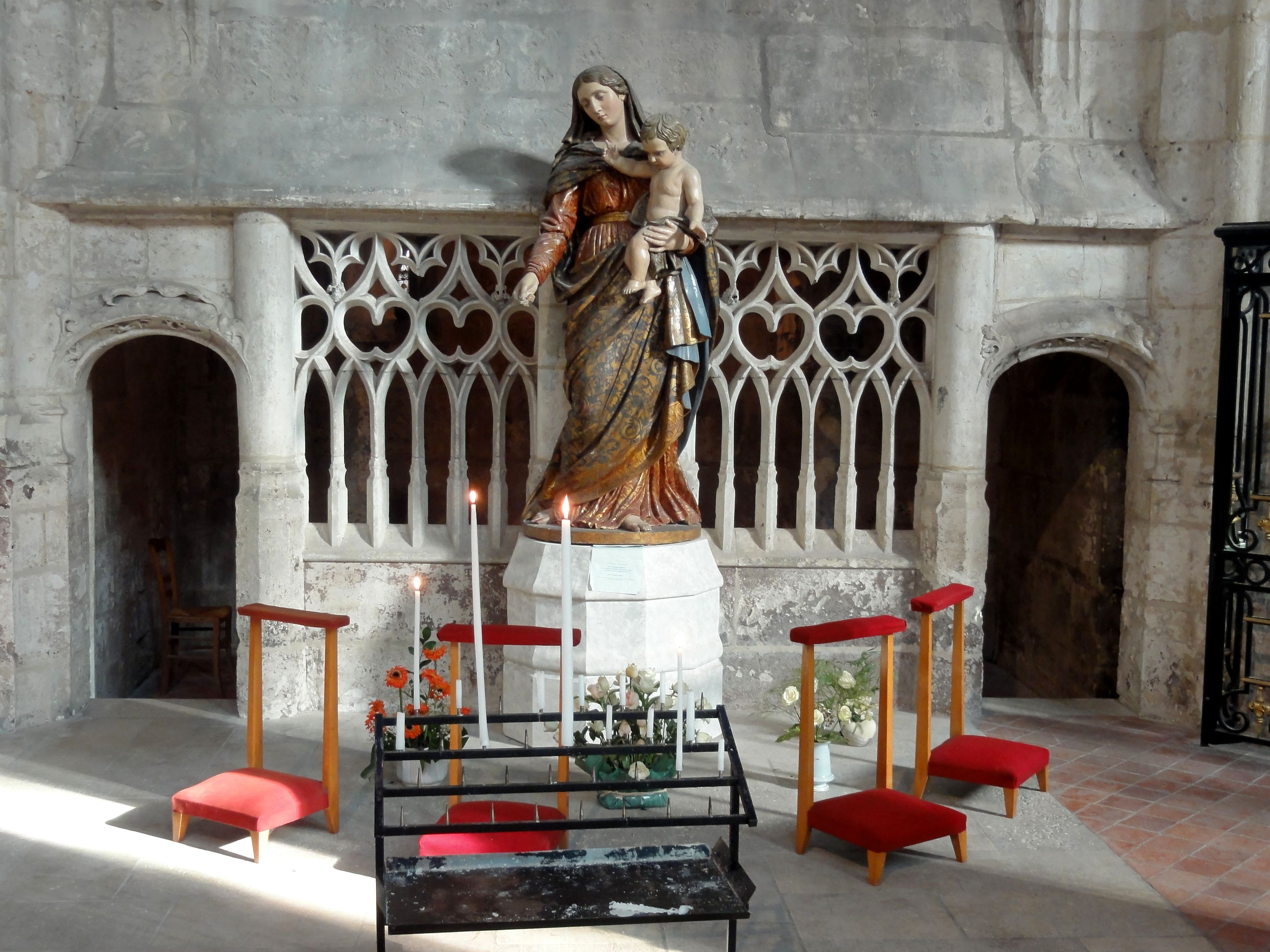 Ancienne chapelle du Saint-Sépulcre, aujourd'hui chapelle baptismale, devant la première chapelle du collatéral nord du chœur.